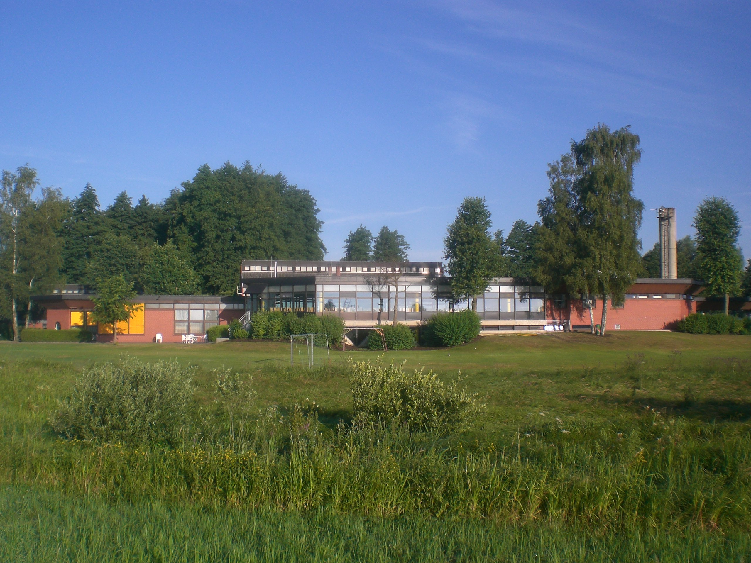 Jugendfreizeitzentrum am Dümmersee in Damme-Dümmerlohausen (Niedersachsen, Deutschland)